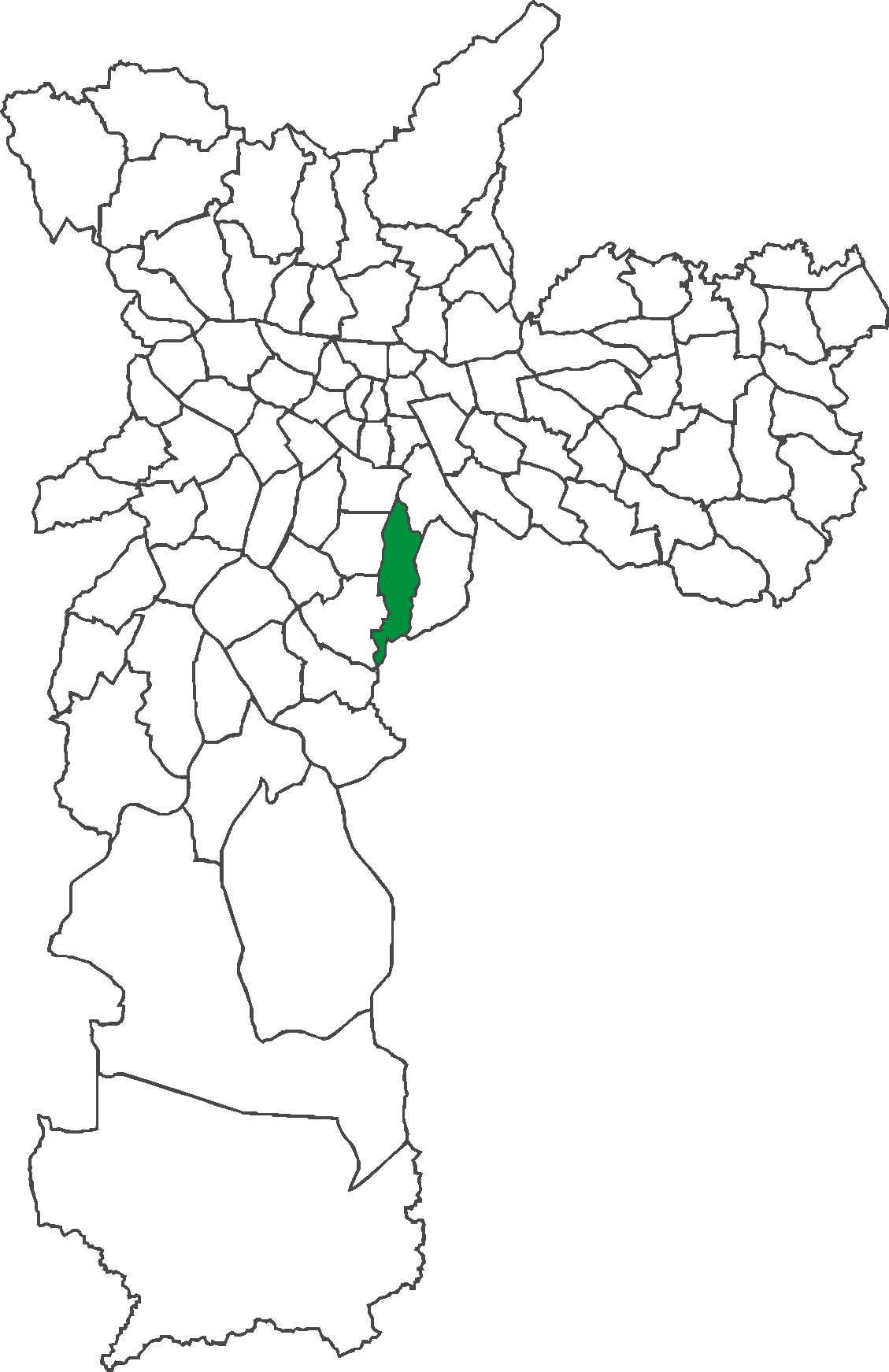 Localização do distrito do Cursino no município de São Paulo.